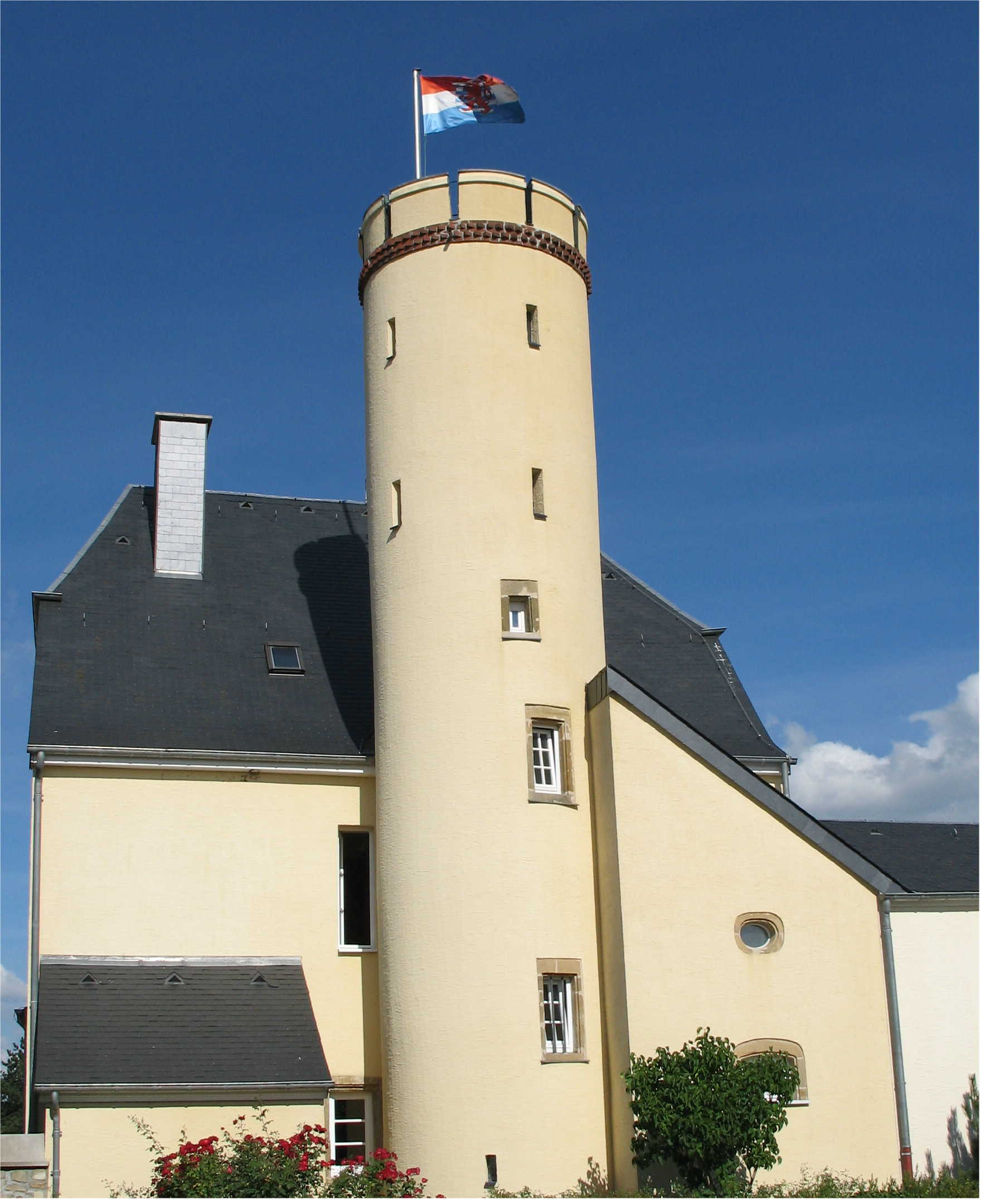 Gemeng Betzder Kategorie:Gemeng Betzder